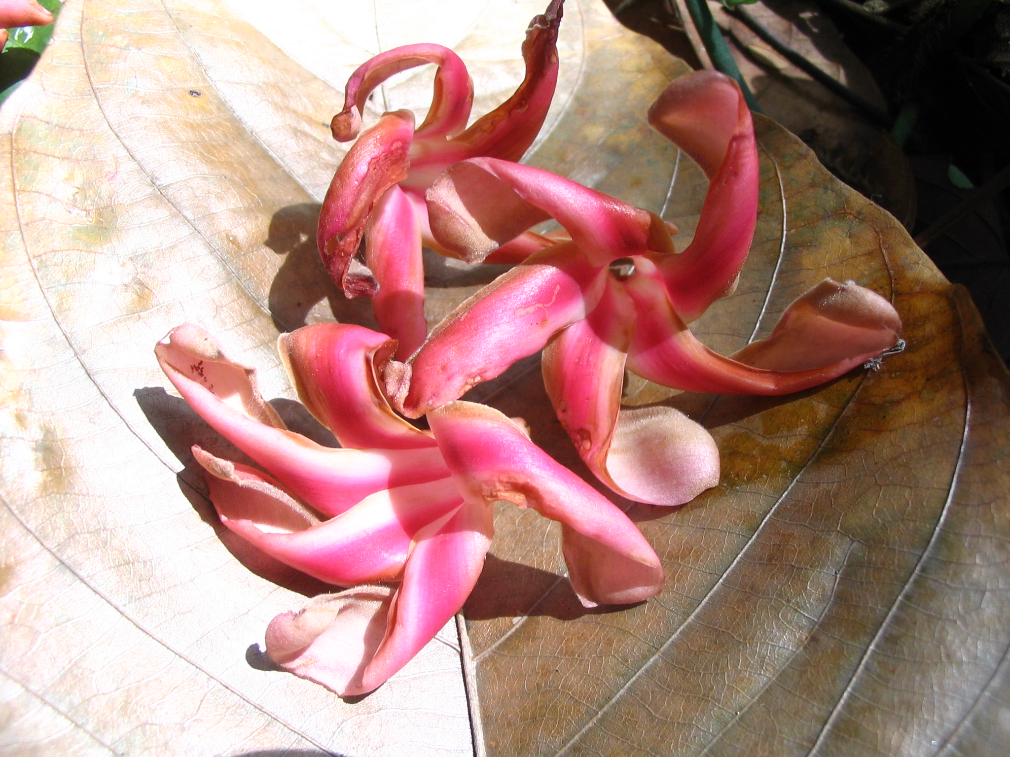 Dipterocarpus baudii - Corolles fanées tombées au sol - Bukut nanas Forest reserve - kuala Lumpur- malaisie